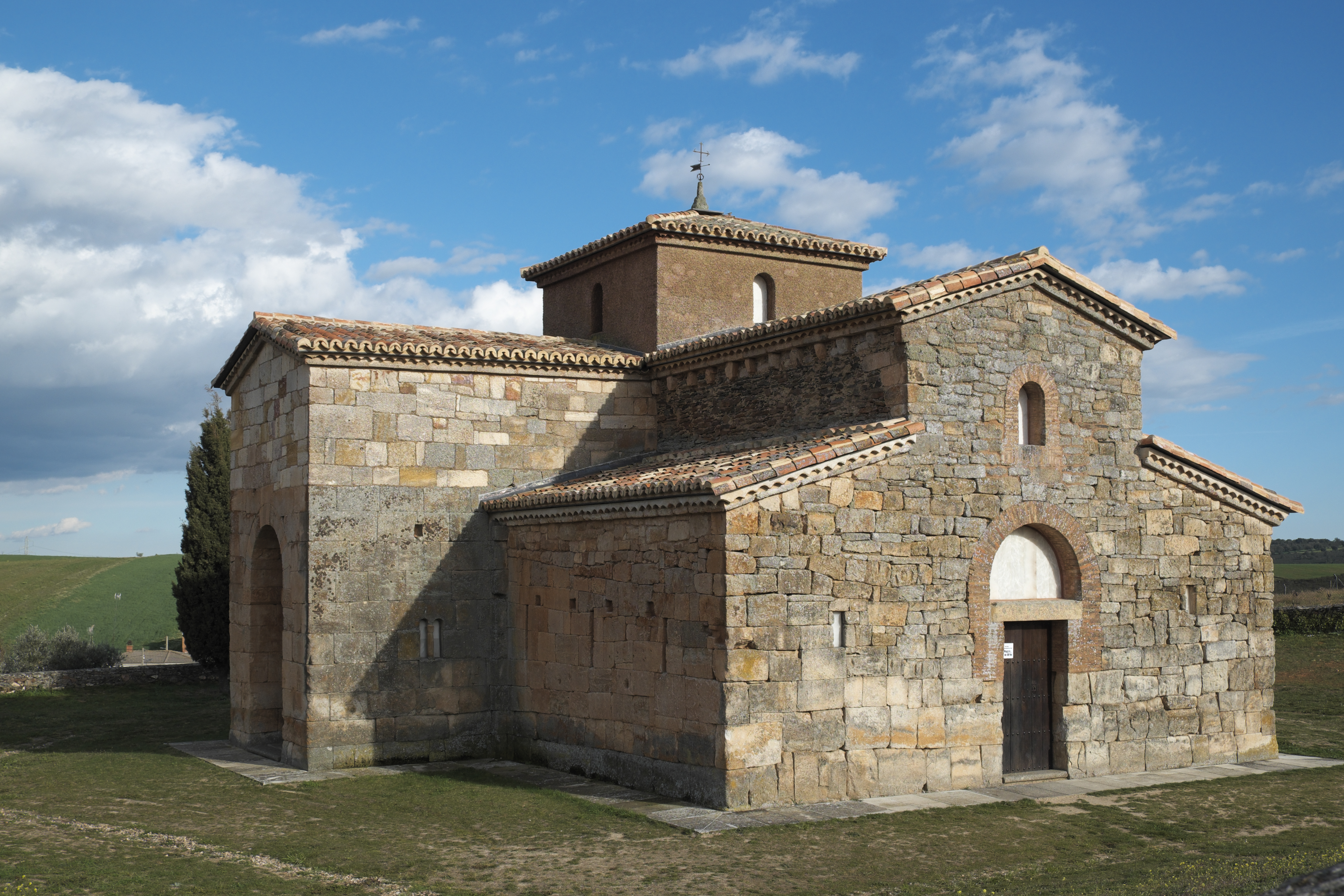 Kirche San Pedro de la Nave in El Campillo, einem Ort in der Gemeinde San Pedro de la Nave-Almendra in der Provinz Zamora (Kastilien-León/Spanien)